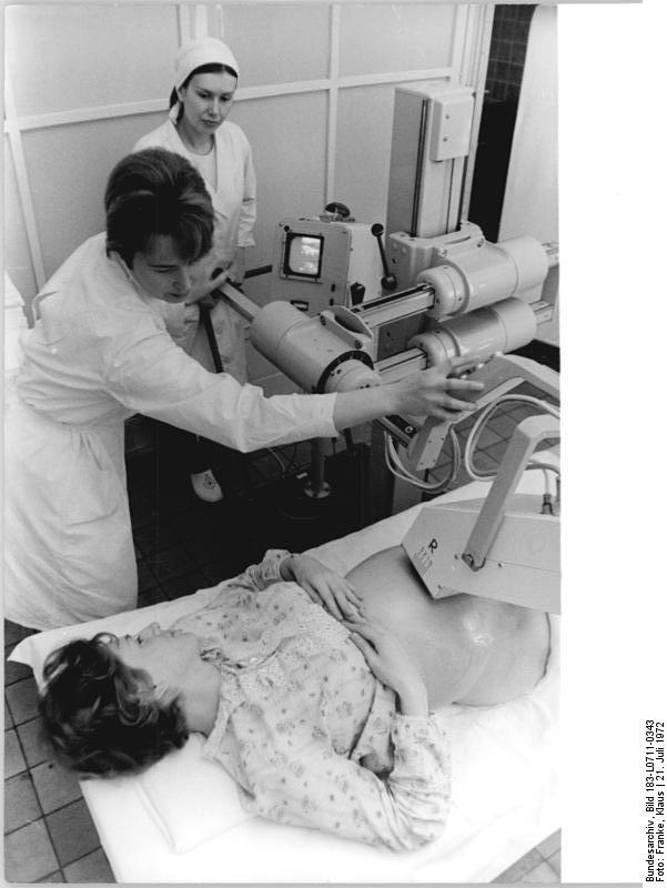 Berlin, Charité, Ultraschalluntersuchung ADN-ZB Franke hsch-21.7.72- Frauenklinik der Berliner Charité arbeitet mit Ultraschallgerät- Seit einiger Zeit werden Ultraschallwellen ohne Gefährdung für Mutter und Kind in den Dienst der geburtshilflichen Diagnostik gestellt. An der Frauenklinik der Berliner Charité existiert bisher das einzige Ultraschallschnittbildgerät (unser Foto) der DDR. Einige andere Geräte, die sogenannten A-Bildgeräte, sind auch in Frauenkliniken der Republik eingesetzt. Der VEB Ultraschalltechnik Halle hat die Entwicklung und Produktion von mehreren Ultraschallgerätetypen aufgenommen, so daß in nächster Zeit Ultraschallschnittbildgeräte in den Handel gebracht werden. Das Ultraschallschnittbildgerät wird zur Schwangerschaftsdiagnostik - schon in der Frühschwangerschaft - eingesetzt. Mit seiner Hilfe kann man Mehrlingsschwangerschaften, ebenso die Lage und die Größe des Kindes zu jedem Zeitpunkt der Schwangerschaft erkennen und Sitz und Größe der Nachgeburt bestimmen. Es wird ferner zur Erkennung von Gebärmutter- und Eierstockgeschwülsten benutzt. Der Einsatz in der Schwangerschaftsdiagnostik bedeutet nicht nur einen großen Fortschritt für die rechtzeitige Feststellung von Abweichungen im Schwangerschaftsverlauf, sondern erspart auch mancher Schwangeren unnötig lange Beobachtungs- und Liegezeiten in der Frauenklinik und damit Ausfall am Arbeitsplatz.